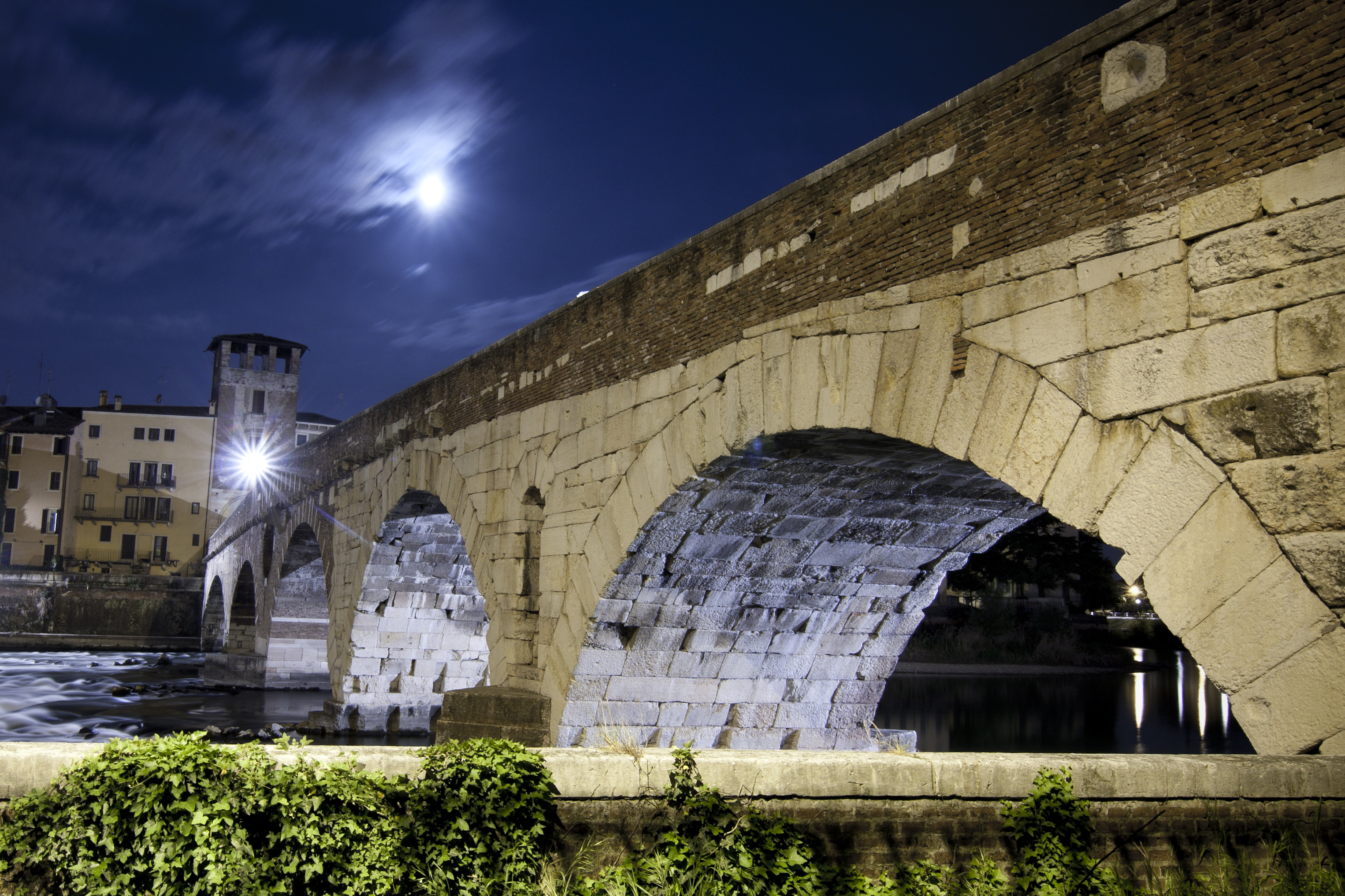 Foto del Ponte Pietra